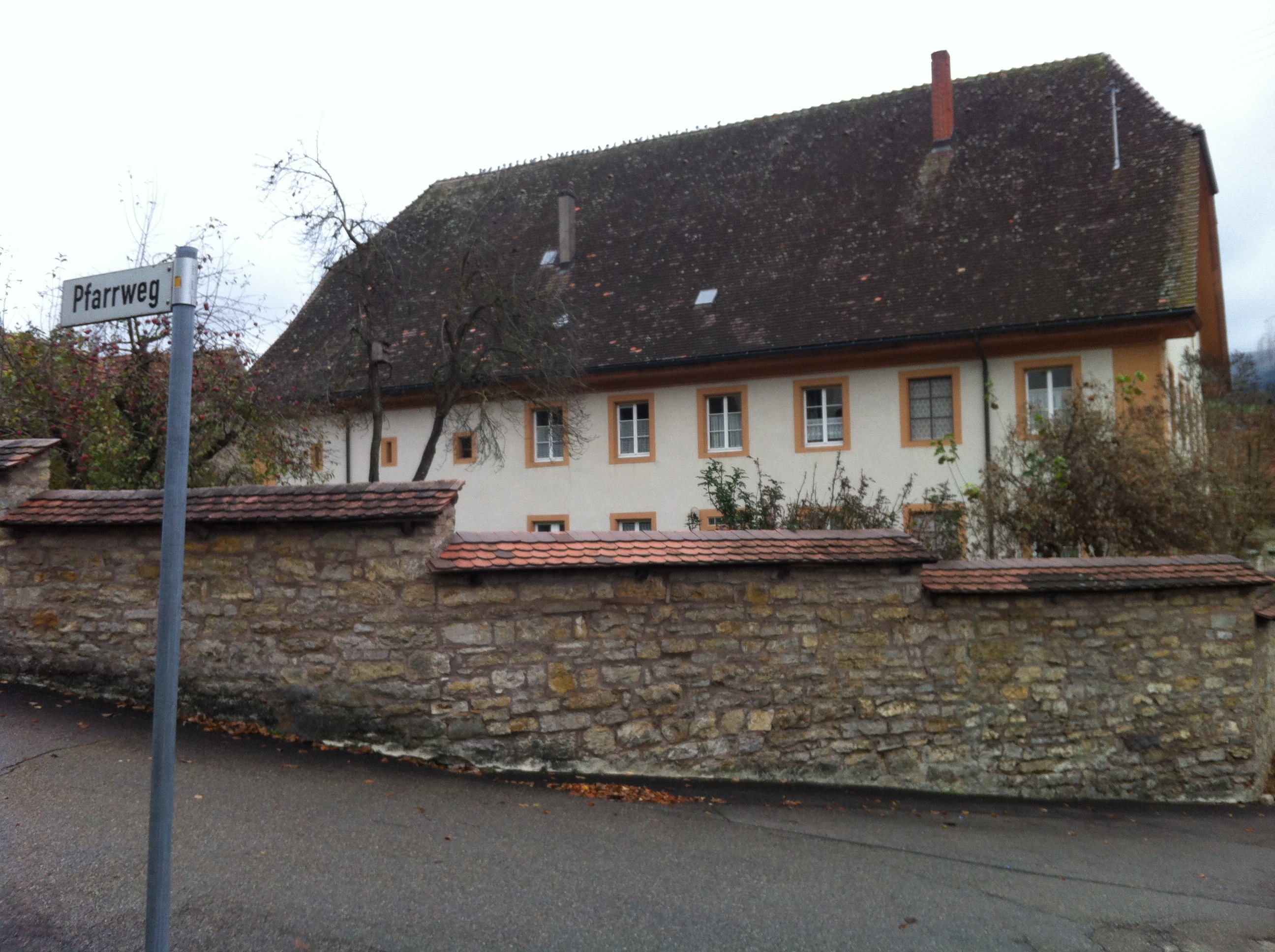 Pfarrhaus in Fützen, Ortsteil von Blumberg, Stadt im Schwarzwald-Baar-Kreis in Baden-Württemberg. 1618 als „neuer Pfarrhof“ errichtet, 1717 renoviert und 1765—1768 grundlegend umgebaut und erweitert. 1961 Innen- und 1973 Außenrenovierung des Pfarrhauses.